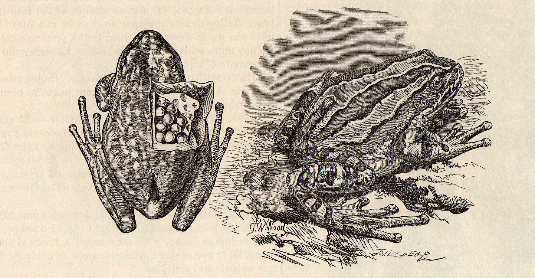 Gastrotheca marsupiata: La existencia de un repliegue entrante en el centro de la parte posterior del lomo 6 de la región lumbar, que forma una bolsa cilíndrica de cerca de un centímetro de profundidad, y cuya abertura se ensancha y encoge en cierto modo a voluntad del individuo. Todo induce a creer que está destinada para receptáculo de los huevos después de la puesta. Tiene la cabeza plana, los ojos no son muy salientes, las extremidades posteriores sobresalen hastante del hocico cuando están tendidas, la empalmadura de los dedos es tan corta, que los deja libres en las tres cuartas partes de su extensión; el lomo y los costados están cubiertos de pequeñas glándulas aplanadas, como las que presentan el pecho y el vientre, reconociéndose muchos poros bien marcados. En la parte posterior de los muslos se ven granitos muy finos, y el resto de las regiones inferiores es lisa. Sobre el tímpano existe una pequena protuberancia glandulosa, y otra de la misma naturaleza detrás de la comisura de los labios. Todas las partes inferiores del animal son de un gris oscuro matizado de pardo, con puntitos blancos sobre un fondo negruzco. El abdomen es gris y la garganta agrisada. Distribución geográfica: México y los Andes, y parece que también se encuentra en Perú.